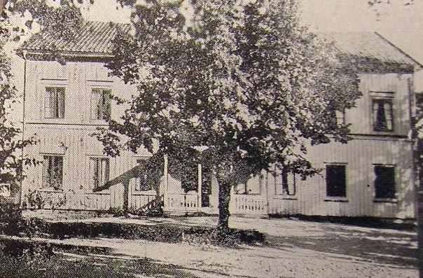 Det andra skolhuset, med adress Mosslegatan